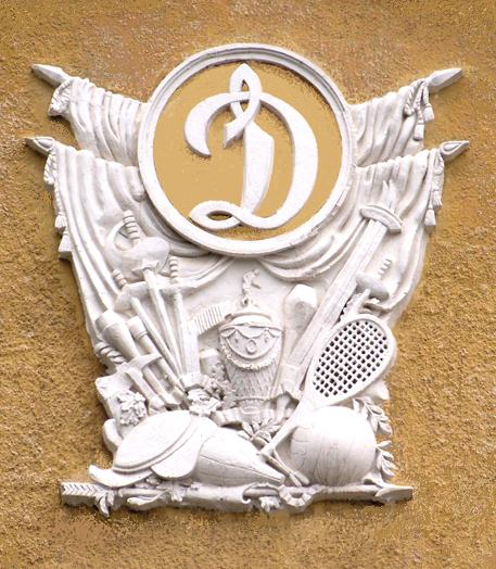 Геральдическая композиция на спортивную тему. Расположена на одном из сооружений Спорткомплекса «Динамо», построенного по проекту архитектора О. Л. Лялина (1925-1934 годах).